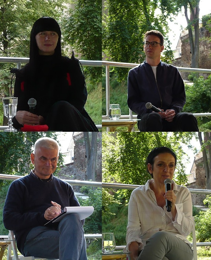 J. Hupało, M. Łoziński, E. Bendyk, J. Lamparska, VI Festiwal Góry Literatury, Pałac w Sarnach, 2020